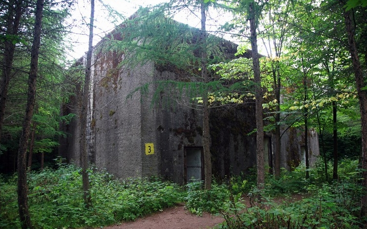 Kwatera Naczelnego Dowództwa Wojsk Lądowych (OKH) w Mamerkach, woj. warmińsko-mazurskie, powiat węgorzewski, gmina Węgorzewo.